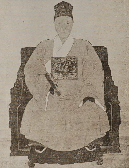 Chân-dung cụ Phương-đình Nguyễn-văn-Siêu (1799 - 1872).